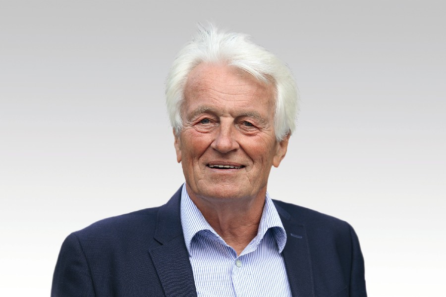 Stefan Schlede, ehemaliger kulturpolitischer Sprecher und Arbeitskreisleiter für Bildung, Jugend, Familie und Wissenschaft der CDU-Fraktion im Abgeordnetenhaus von Berlin.